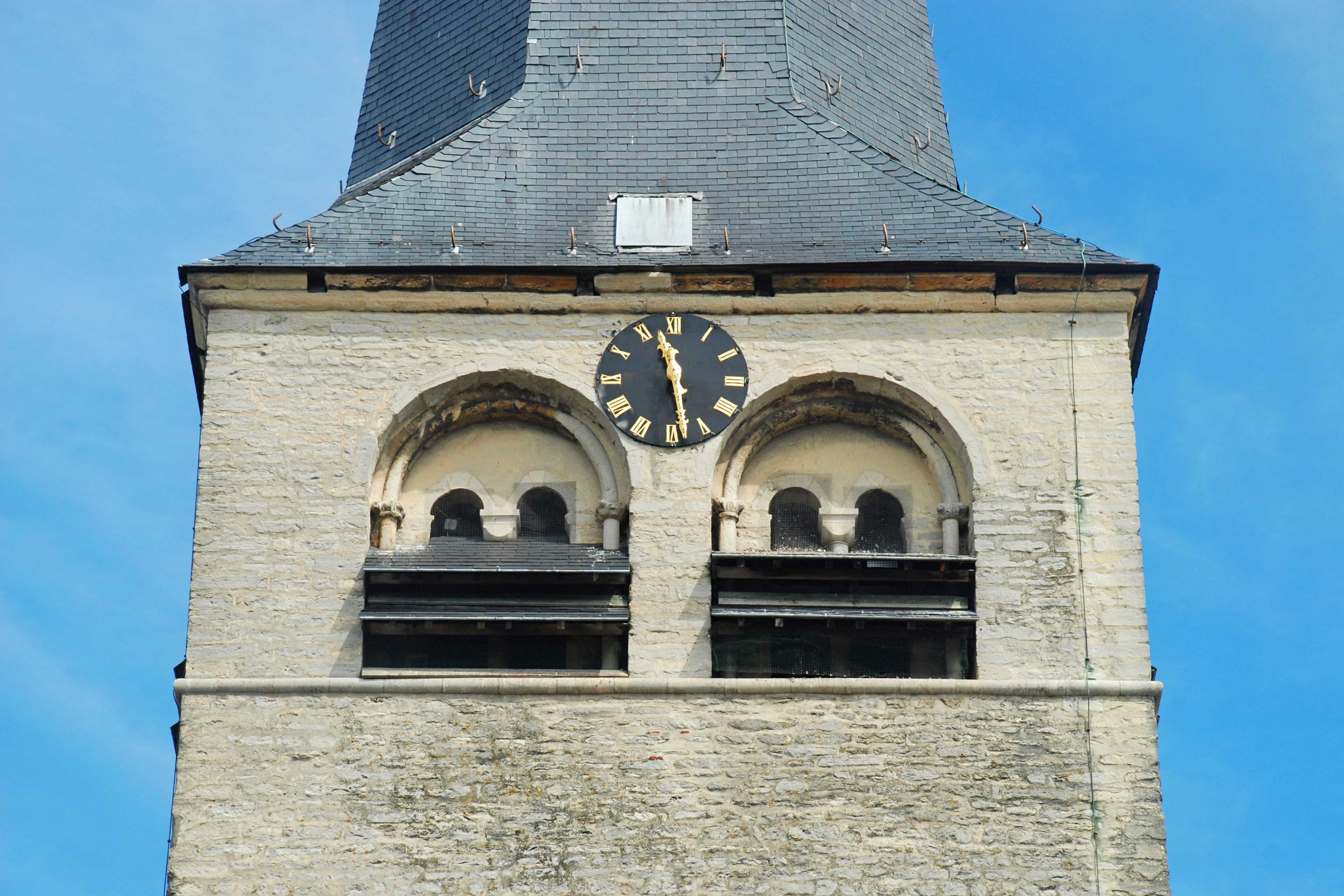 Belgique - Brabant flamand - Steenokkerzeel - Perk - Église Saint-Nicolas This photo of immovable heritage has been taken in the Flemish Region